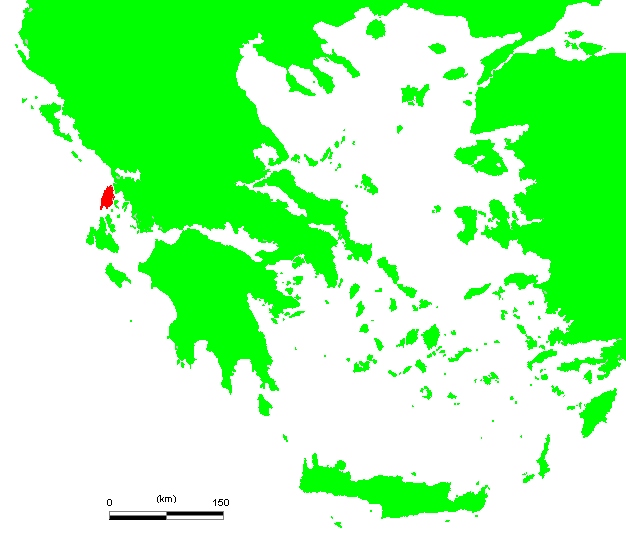 GR Lefkas.PNG (Greek island)